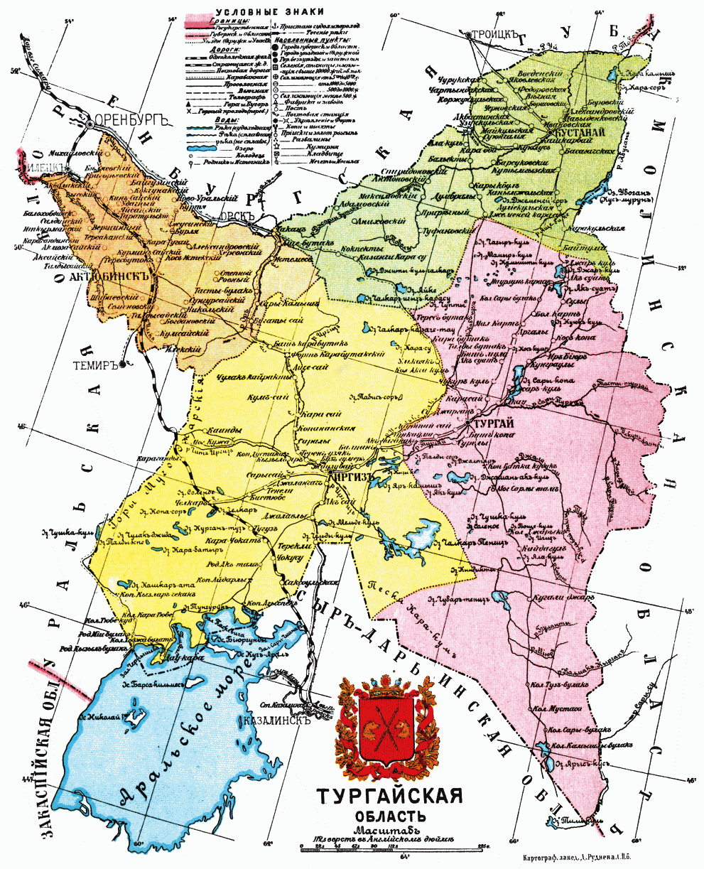 Карта Тургайской области, 1913